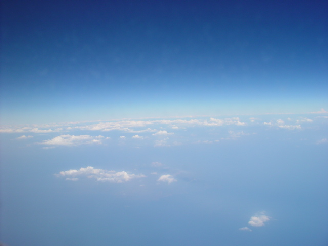 Himmel og skyer tatt fra fly